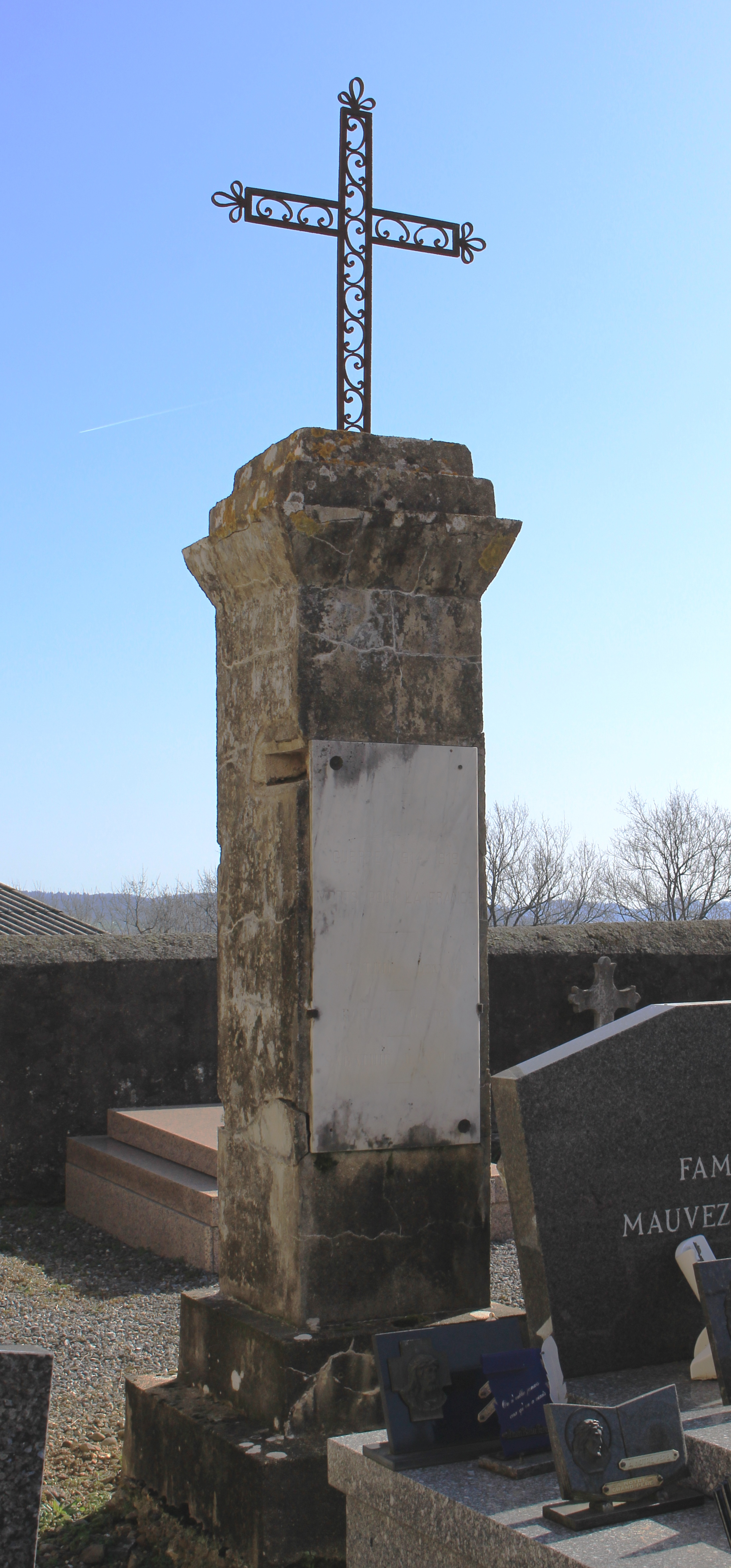 Monument aux morts de Jacque (Hautes-Pyrénées)